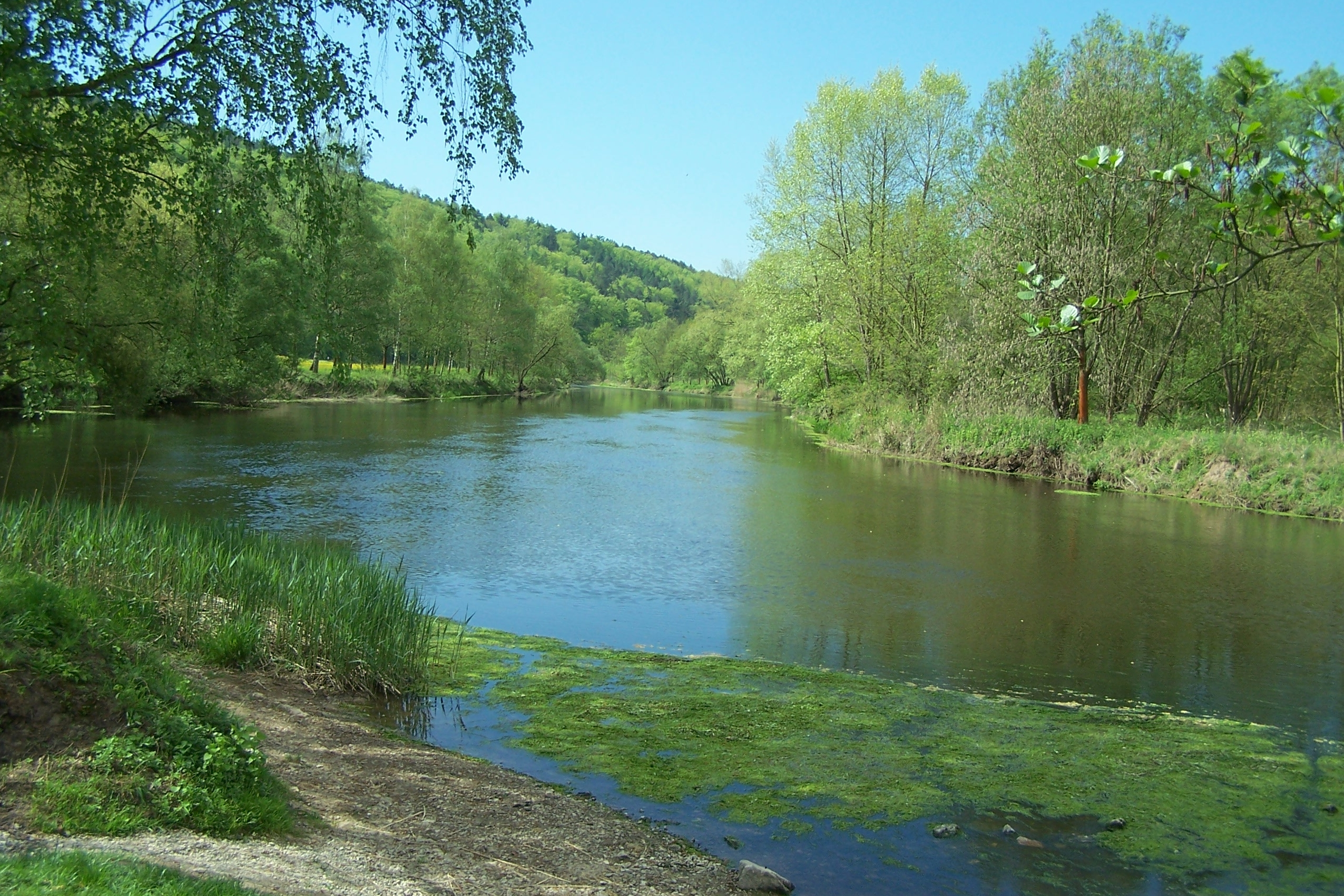 Werrabiegung bei Probsteizella.